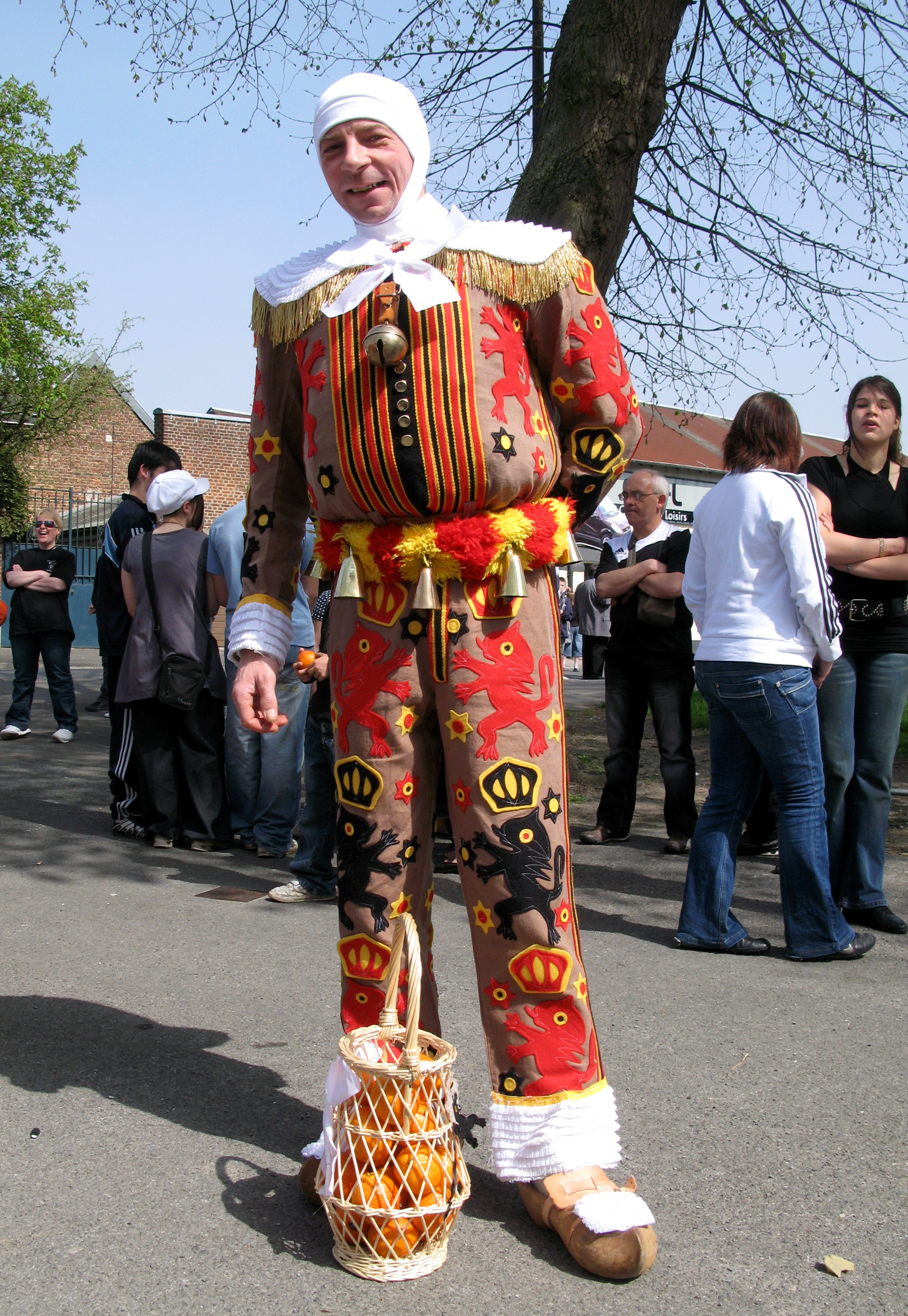 Ham (Somme, France) - Animation festive au centre-ville, un dimanche de printemps. Les géants sont regroupés sur (ou non loin de) la place du Jeu de Paume, derrière la salle des fêtes, avant la parade. Un des Gilles (typiques avec leur coiffe blanche, leur costume molletonné, leurs grelots et leur panier d'oranges).